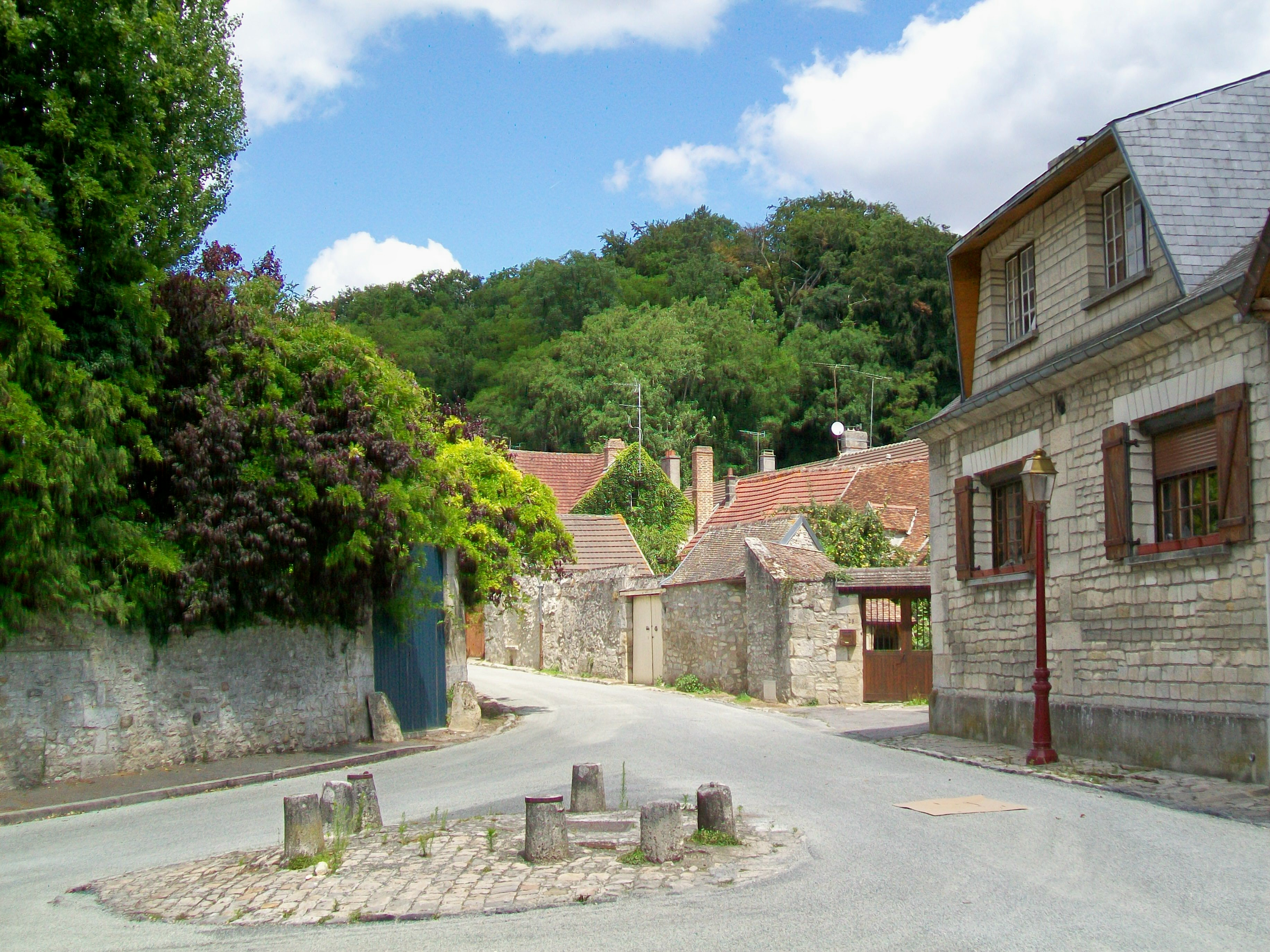 Le carrefour de trois rues à l'est du vieux village : rue de l'Église (à gauche), rue du puits Berthaud (au fond) et rue Saint-Christophe (à droite derrière le photographe). Le petit rond-point correspond à l'emplacement de l'ancienne Grande fontaine (cf. Roger Ana, Fleurines au 20e siècle, p. 36-37.).